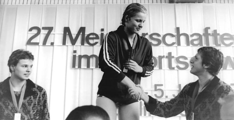 Kornelia Ender, Birgit Treiber ADN-ZB Mittelstädt 3-6-76 Berlin: 27. Meisterschaften der DDR im Sportschwimmen (3.Tag)-Über 100 m Rücken (1:01,62min) schwamm Kornelia Ender (SC Chemie Halle-Mitte) bereits ihren dritten Titel und zugleich ihren dritten Weltrekord heraus. Während der Siegerehrung links die Weltmeisterin, Ex-Weltrekordhalterin und Titelverteidigerin Ulrike Richter (2.Platz-1:02,00). Rechts Birgit Treiber (3.Platz-1:02,78-beide SC Einheit Dresden).